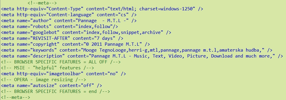 Web Metadata